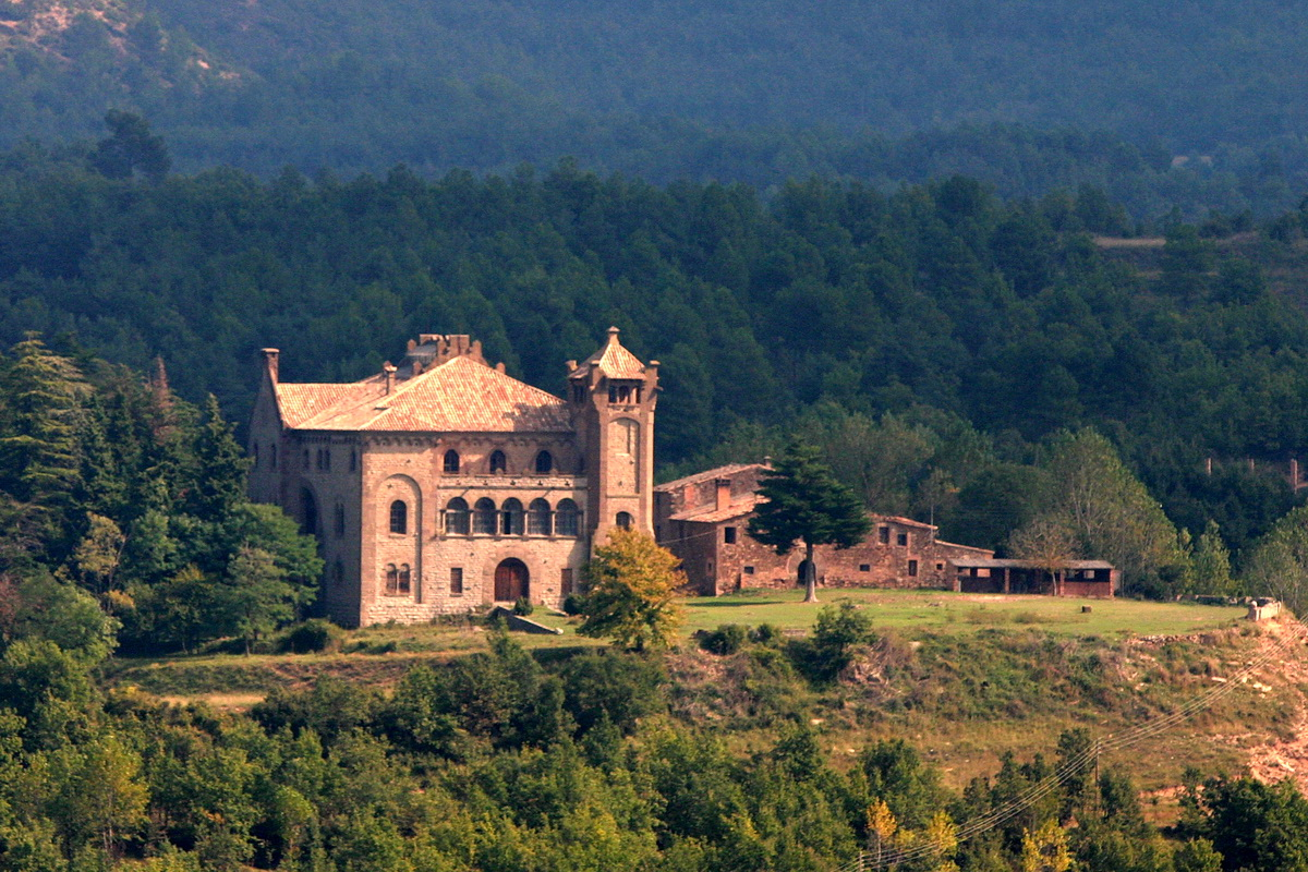 Castell de Rocabruna, obra modernista-eclèctica de 1919 d'Eduard Maria Balcells i Buïgas a Sant Feliuet de Terrassola, Santa Maria d'Oló (Moianès-Catalunya)